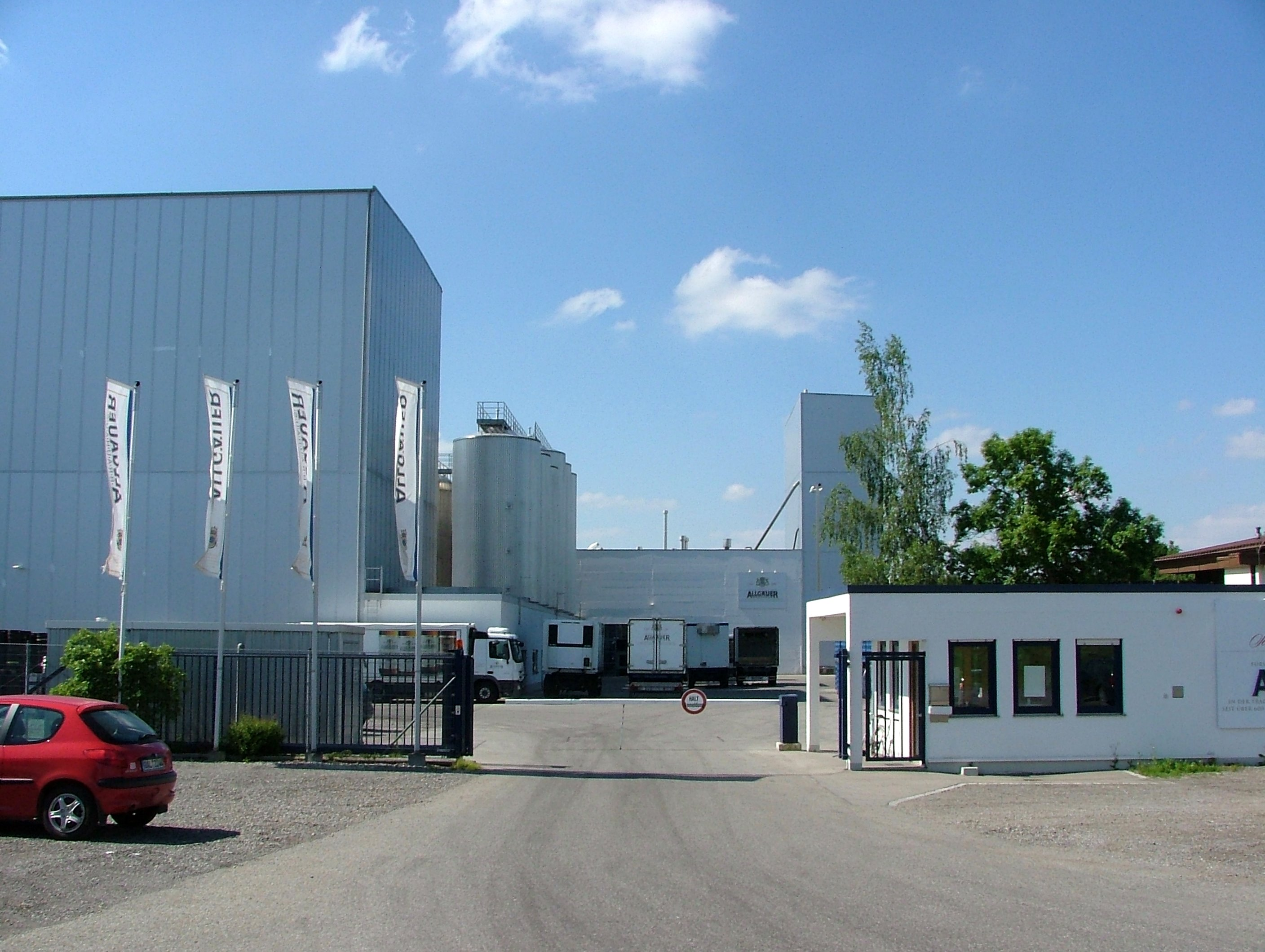 Braustätte des Allgäuer Brauhauses, ehemals Sailerbräu